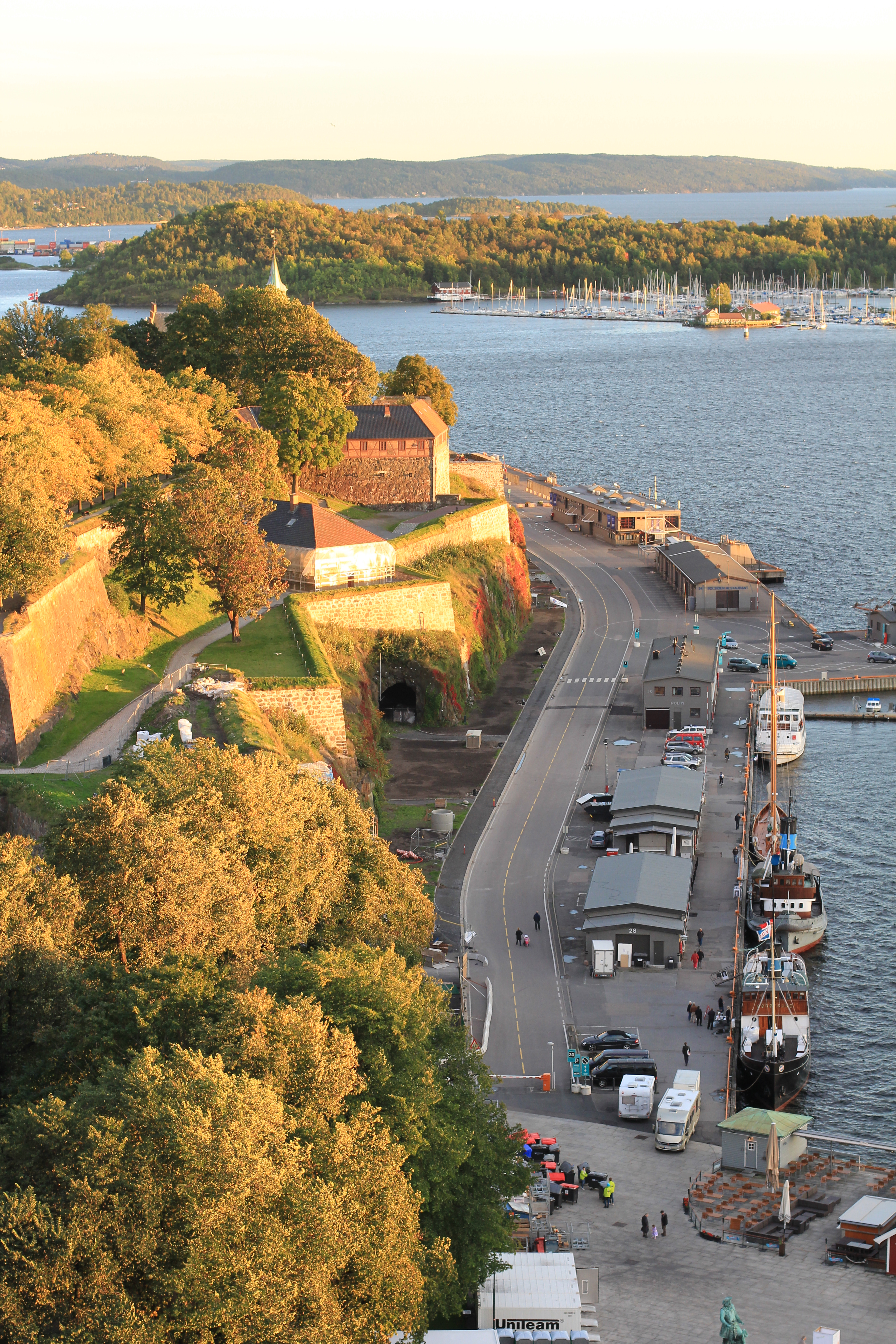 Akershusstranda er et område mellom Oslofjorden og Akershus festning og slott i Oslo.